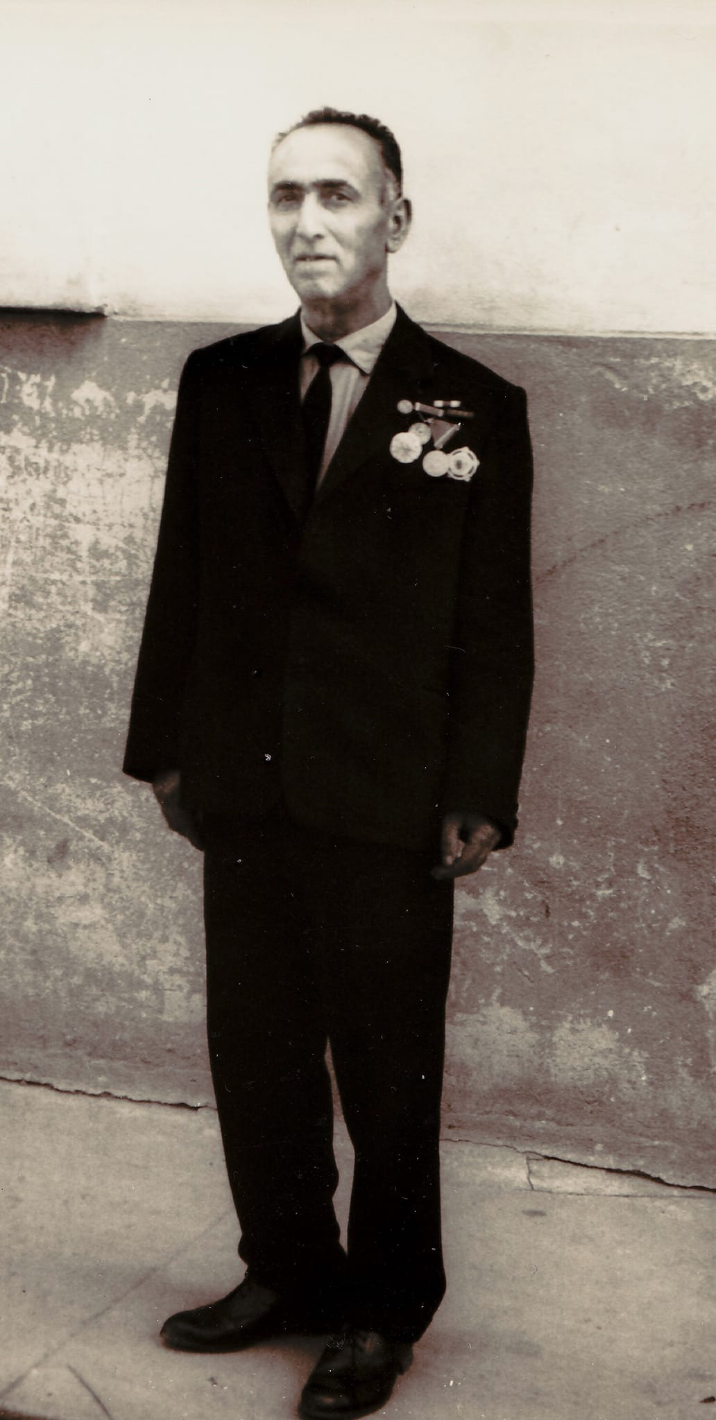 Тане Наумов